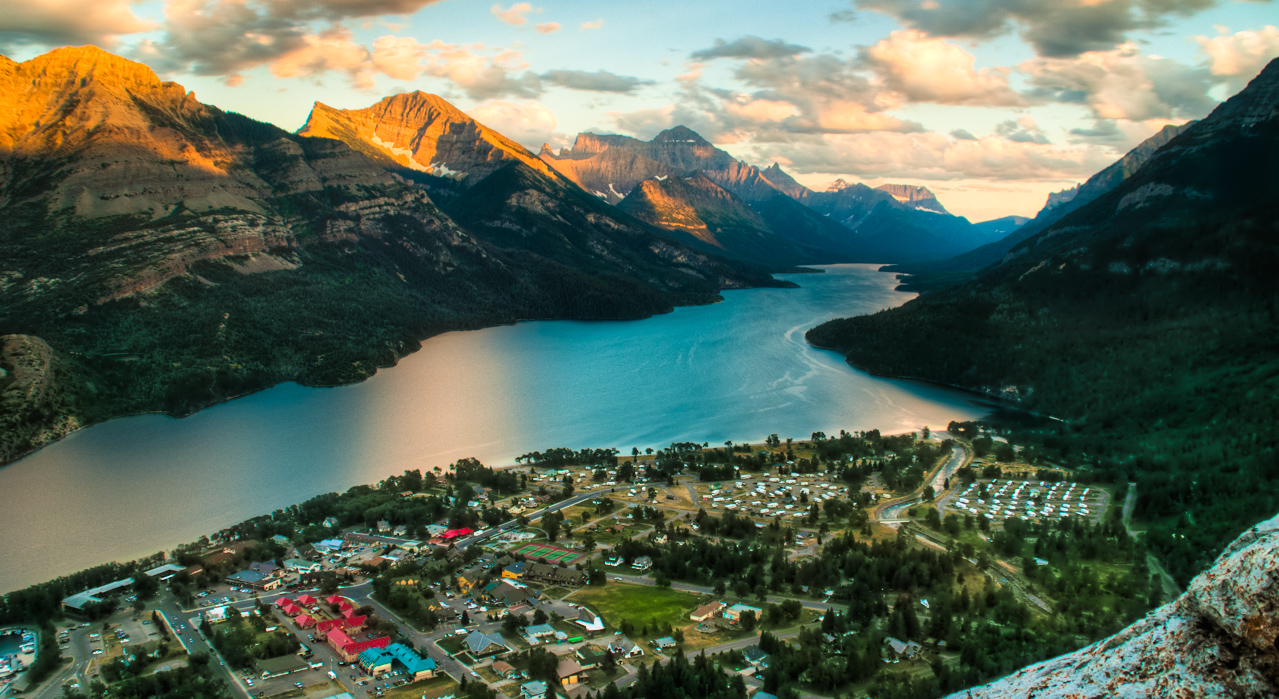 Vue panoramique de Waterton et du lac Waterton Supérieur